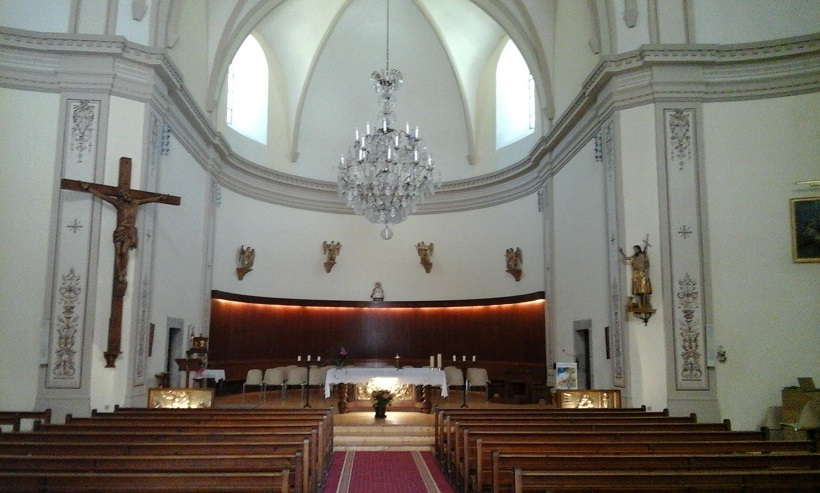 intérieur de Lullin